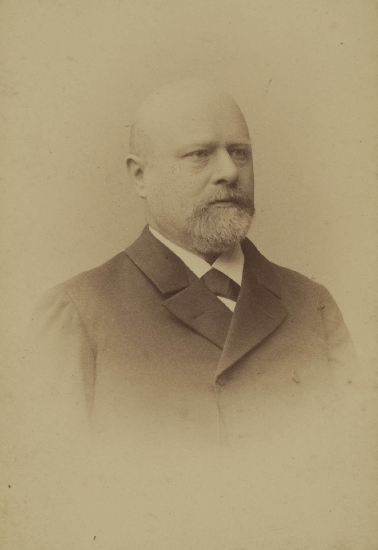 August Caesar Joseph Barazetti, Jurist, 1889–1897 Professor in Heidelberg